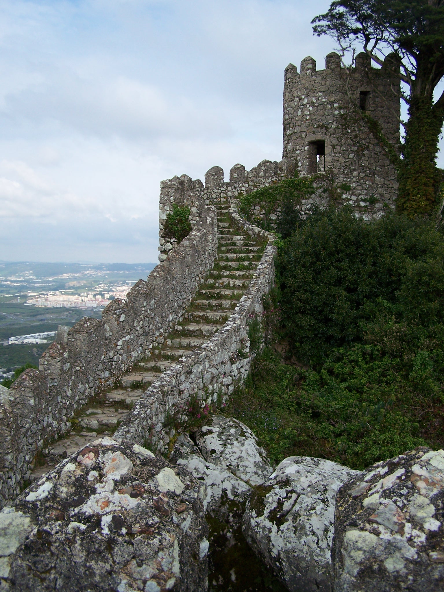 Castelo dos Mouros em Sintra, Portugal.